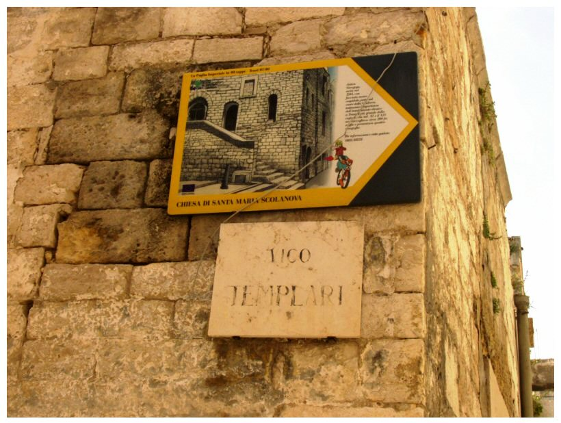 Cartello turistico che indica la chiesa di Santa Maria Scolanova a Trani .